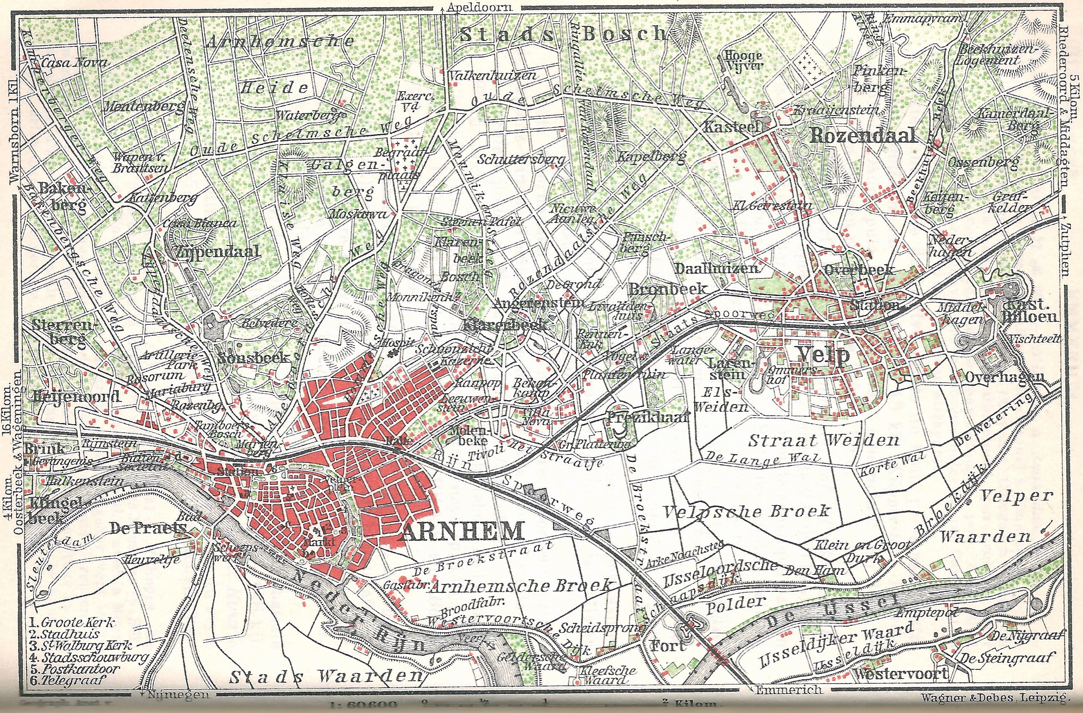 Kaart van Arnhem van 1905 met normaal sporige paardentramlijnen. De tramlijn voorbij Velp is een 750 mm tramlijn van de Geldersche Stoomtramweg Maatschappij.